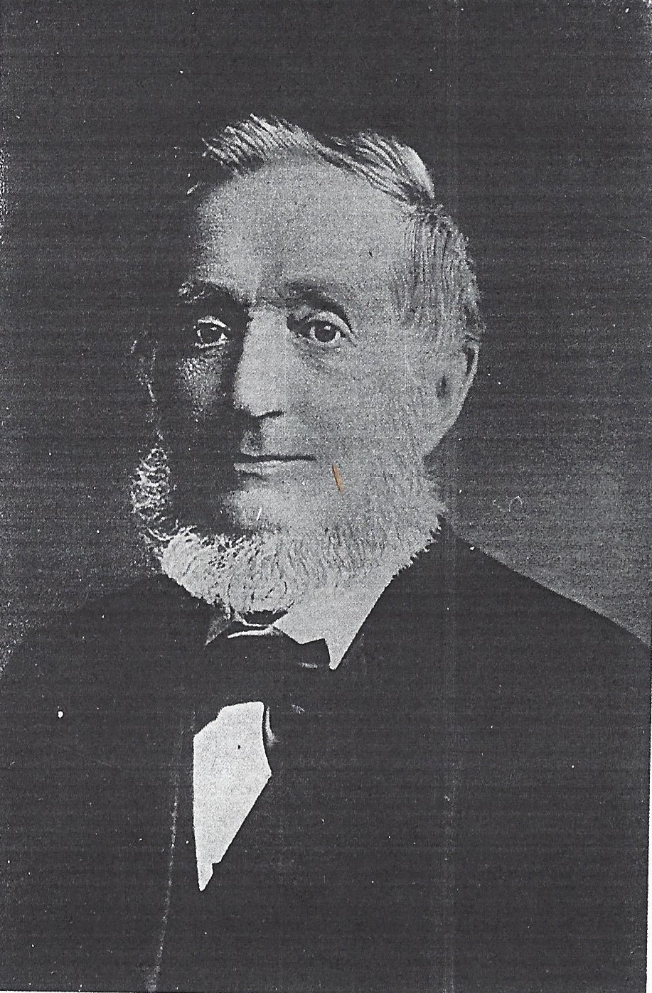 Porträtfotografie von Adolf Eduard von Warnstedt (1813-1894)